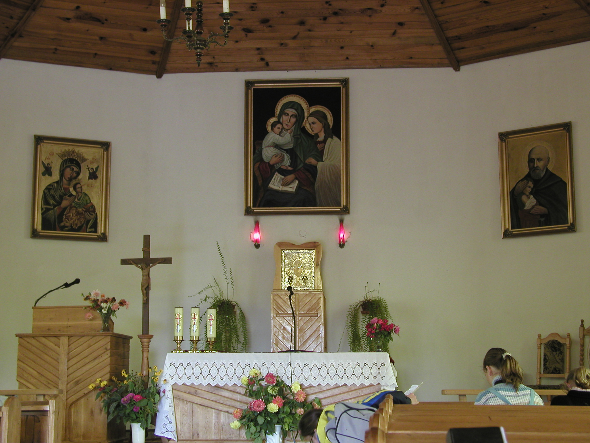 Wnętrze kaplicy pw. św. Anny w Kowalach Autor: Barbara Wrzesińska Data:2005-10-15